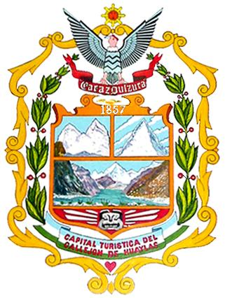 Escudo de Caraz, capital de la Provincia de Huaylas.